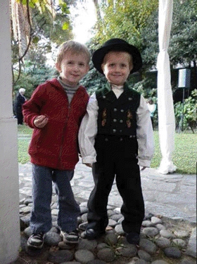 Niños noruego-argentinos, uno de ellos con traje típico durante la celebración del día nacional de Noruega en la casa del Embajador de Noruega en Argentina.